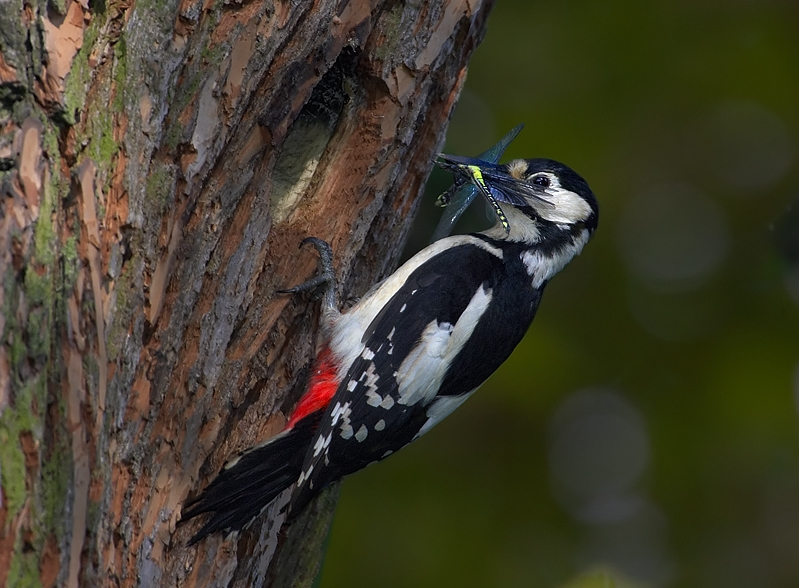 Dendrocopos major, Chomoutovsko